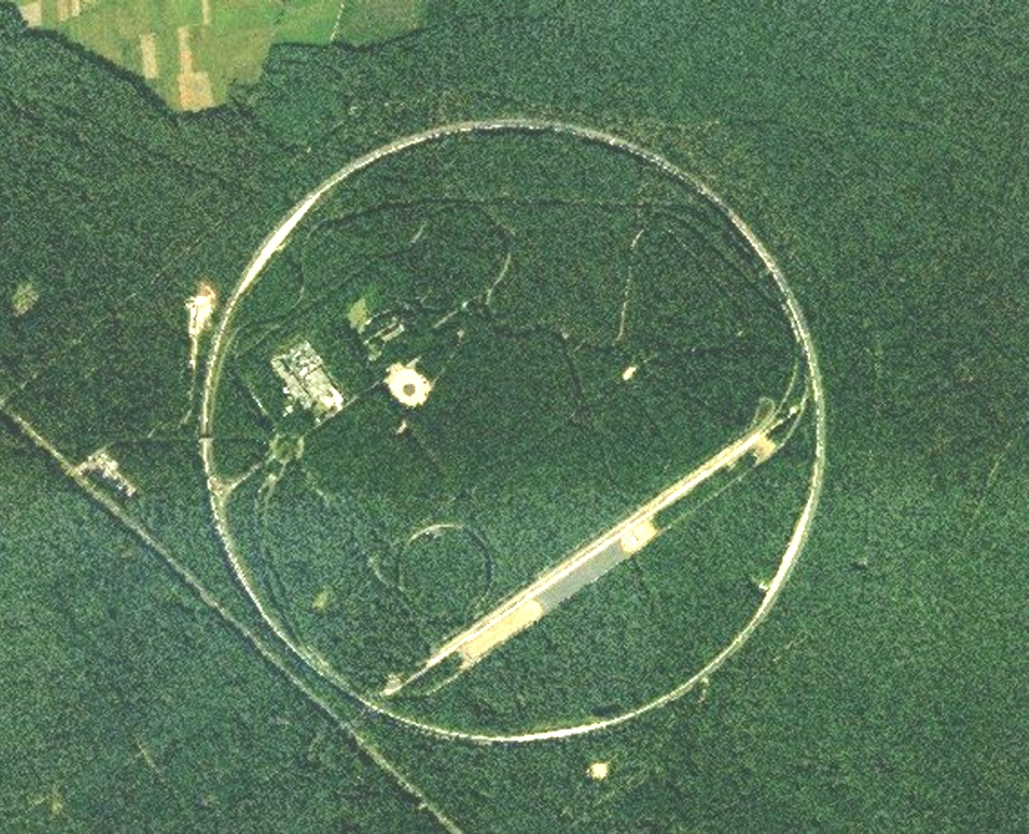 Das Opel-Testzentrum in Rodgau - Luftaufnahme aus 400 m Höhe - 2005 - Bürger-GIS Kreis Offenbach Anfang der 1970er Jahre wählte die Adam Opel AG Rodgau als Standort für ihr Prüfzentrum aus. Inmitten einer 4,8 Kilometer langen Hochgeschwindigkeits-Rundstrecke befinden sich eine Crashtesteinrichtung und eine 6,7 Kilometer lange Teststrecke mit allen erdenklichen Straßentypen (Marterstraße) für Langzeittests. Bild-PD-frei